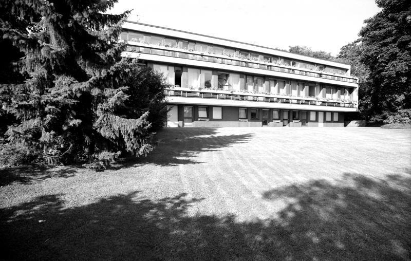 18.8.1989 Bonn, Landesvertretung Nordrhein-Westfalen beim Bund